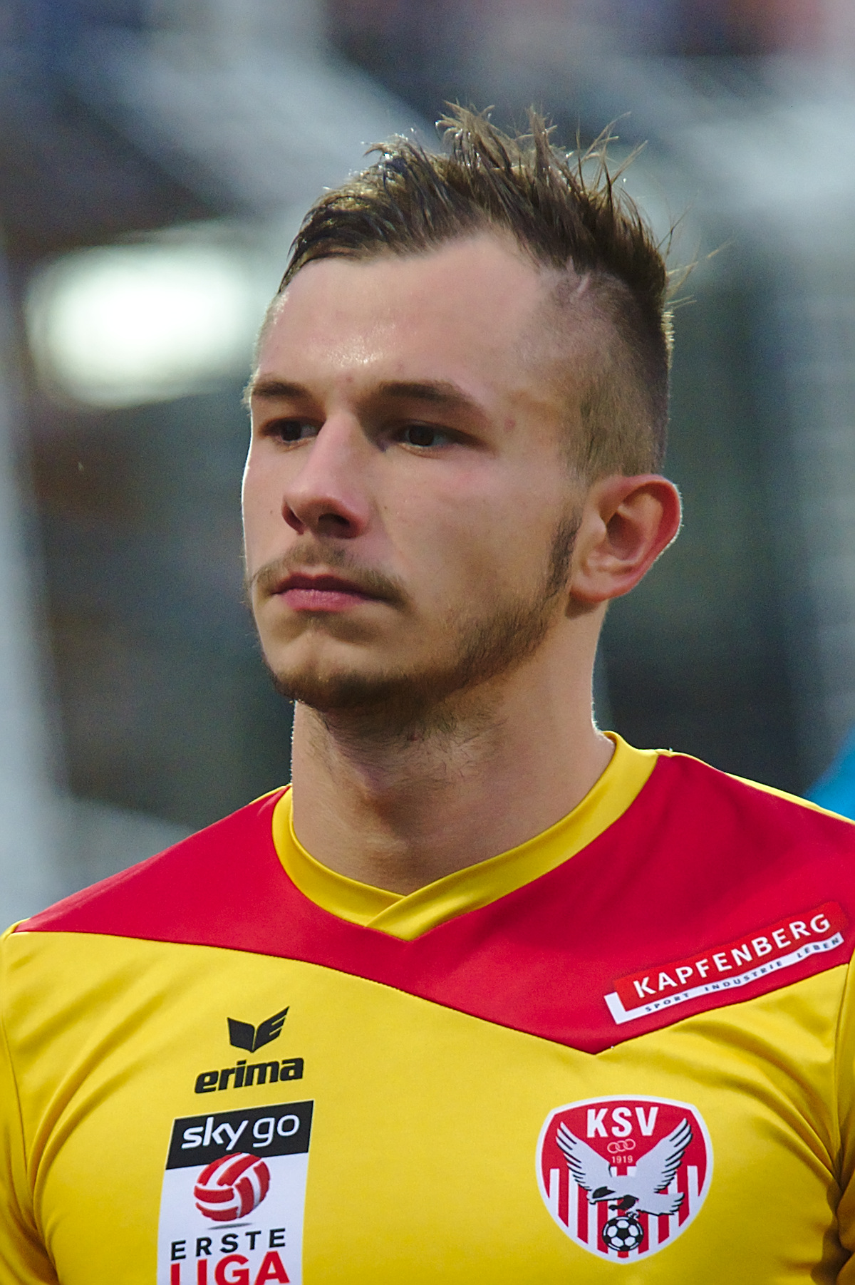 Saisonvorbereitungsspiel Admira Wacker Mödling gegen Kapfenberger SV am 17.6.2017, Bild zeigt: Mladen Jutric